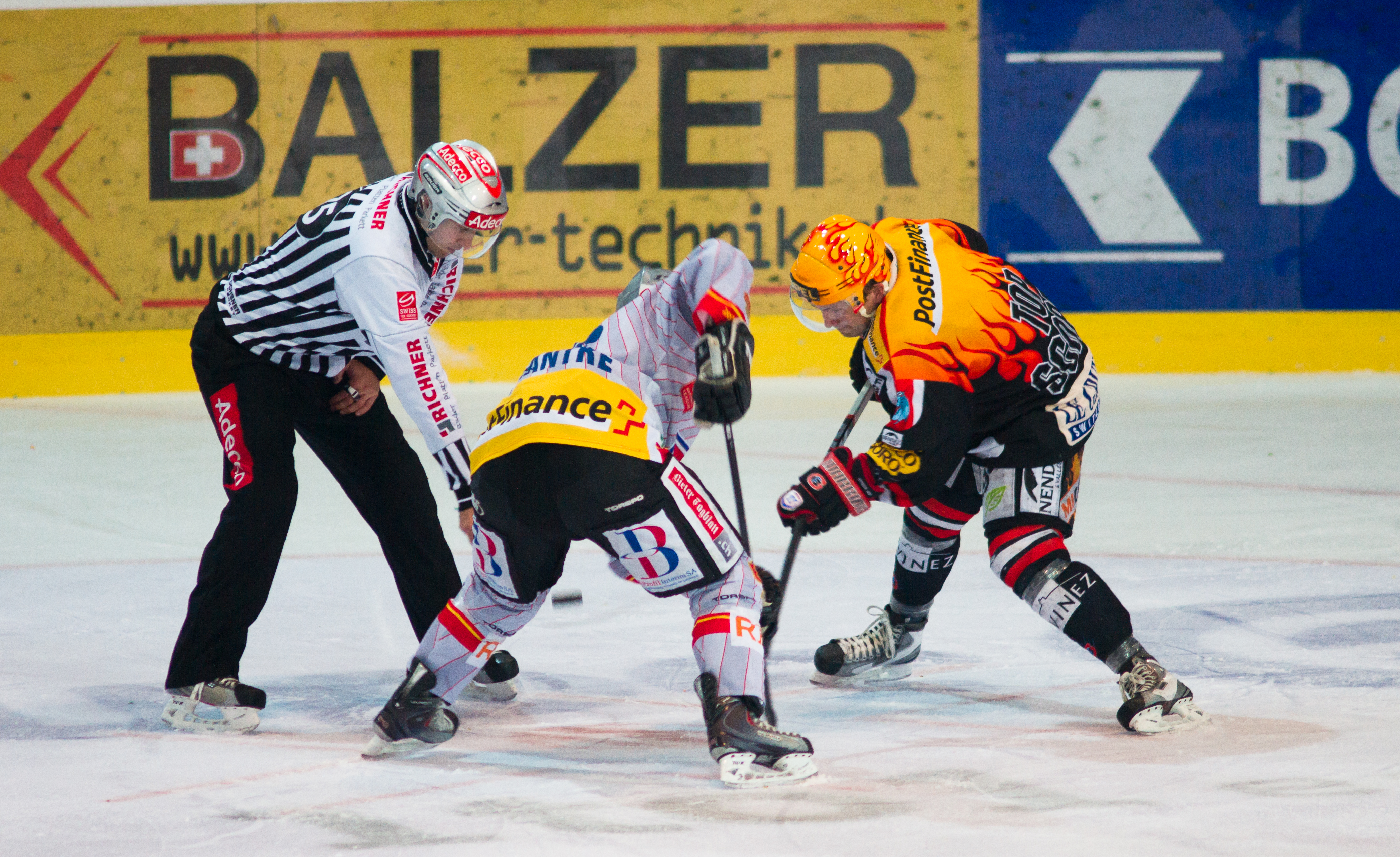 Engagement au hockey entre Fribourg-Gottéron (Bykov) et le HC Bienne. LNA.